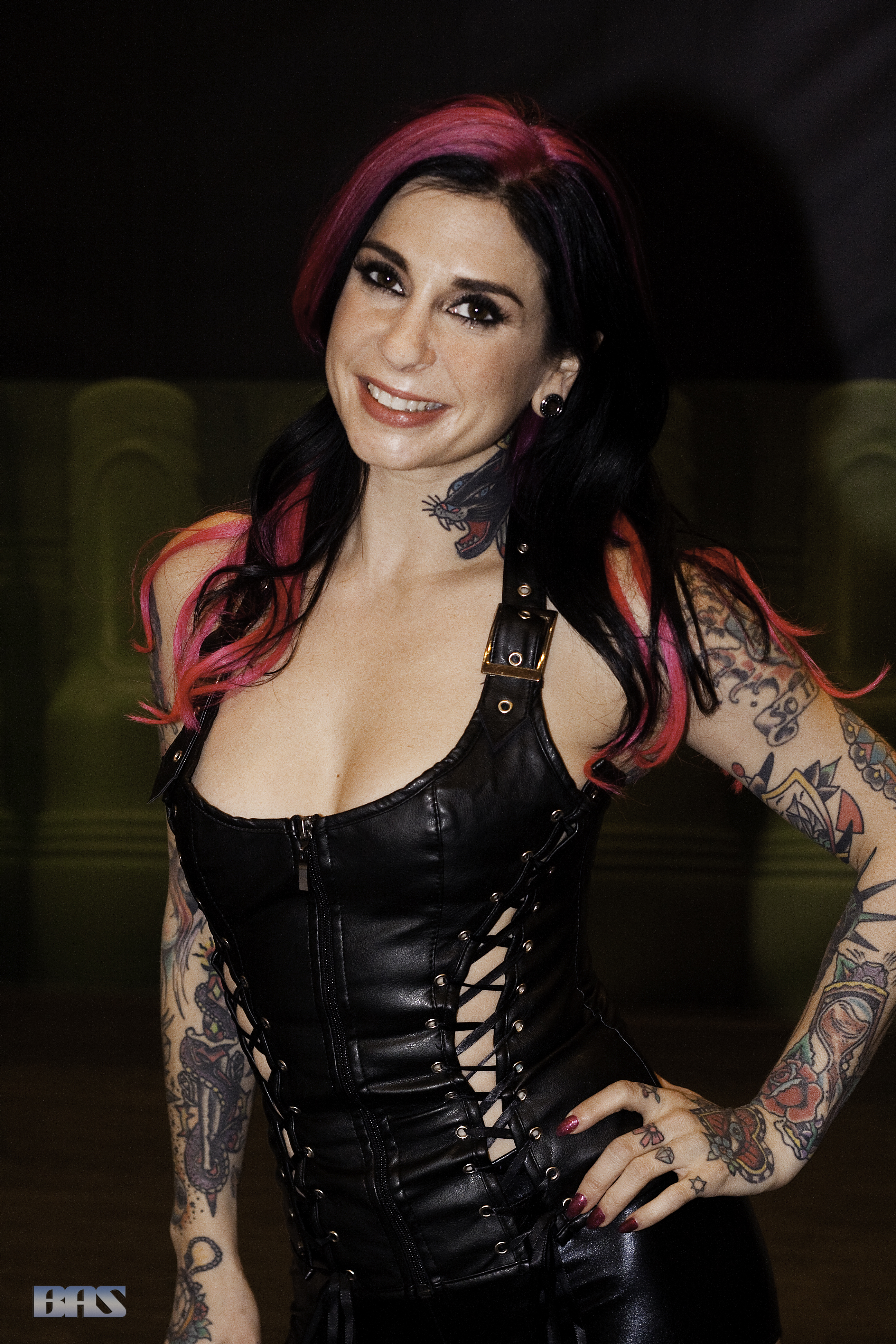 AEE16_0210bas